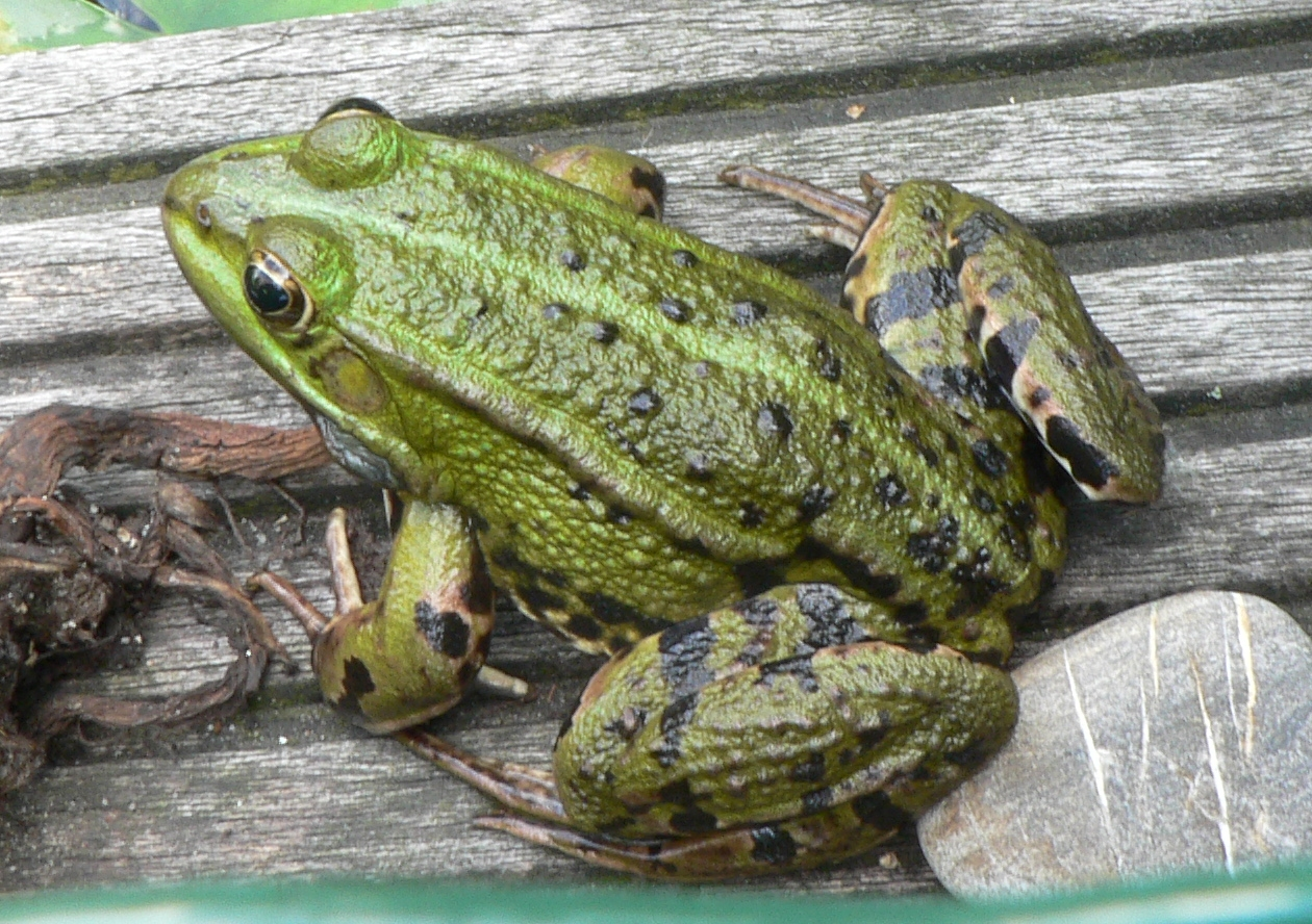 Green frog, Belgium